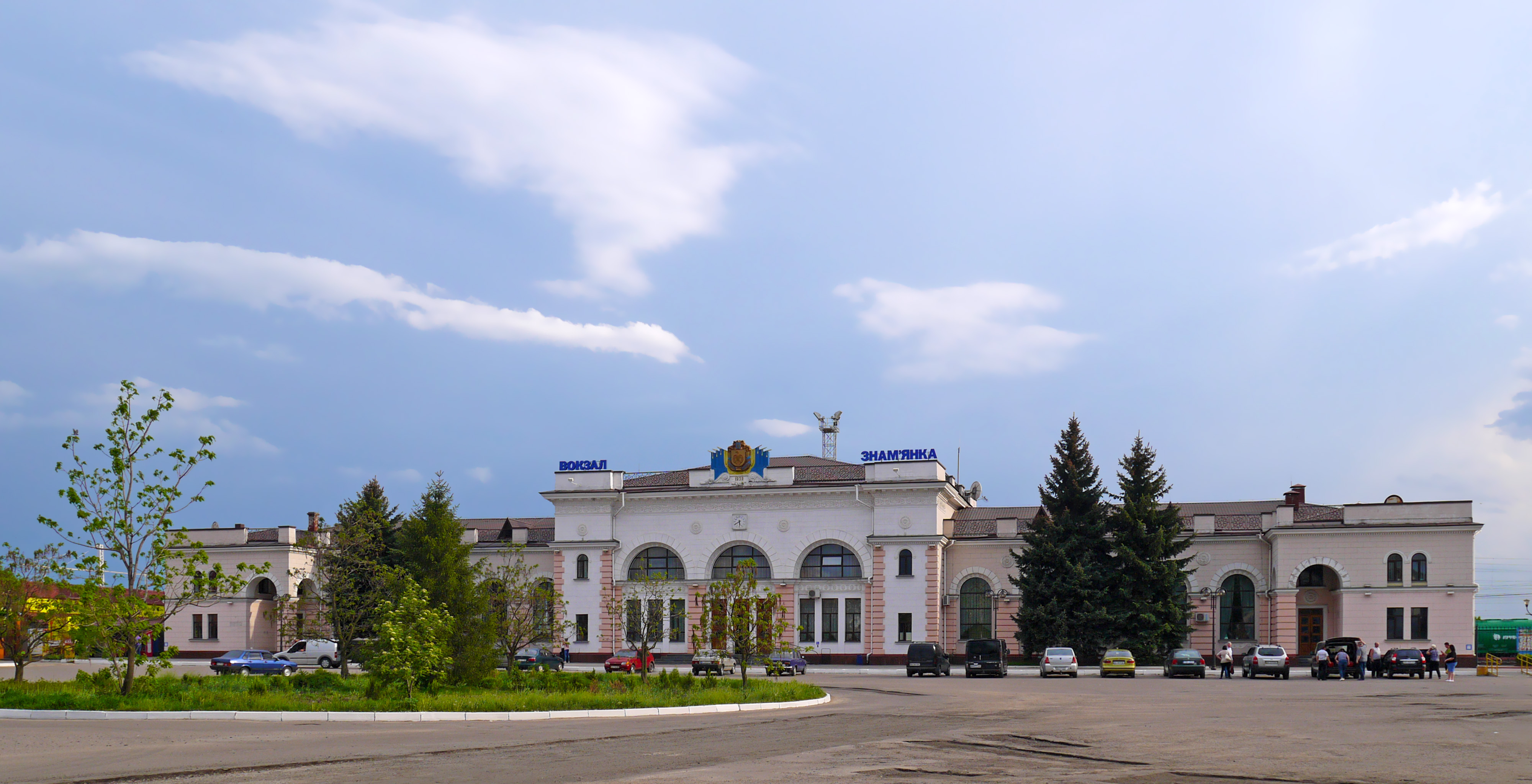 Залізничний вокзал, Знам'янка, вул. Привокзальна